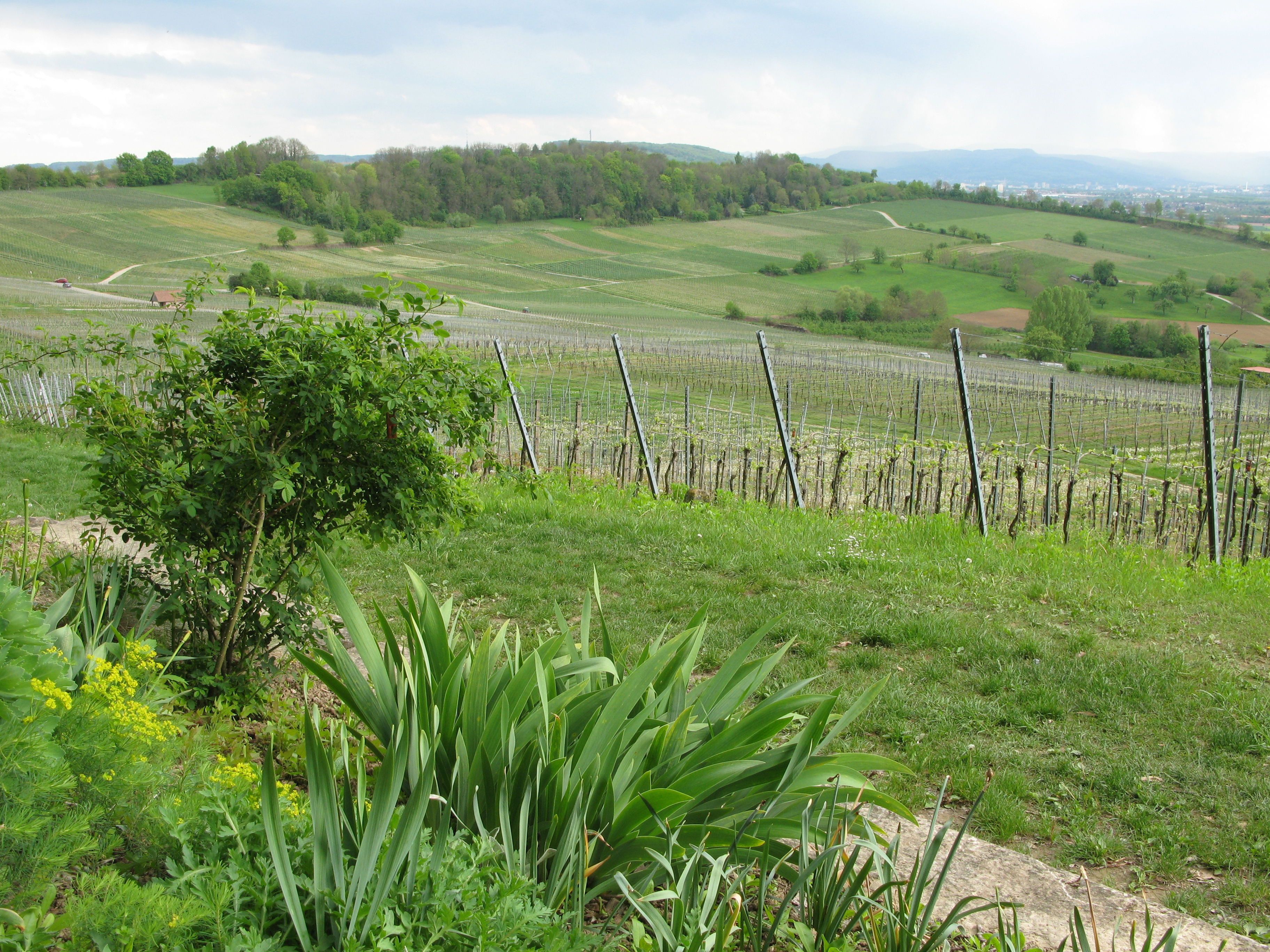 Sicht vom Läufelberg auf Basel bei Fischingen am Fernwanderweg Markgräfler Wiiwegli im Markgräflerland.